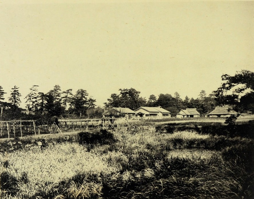 『越山若水』1910年収載。加藤竹雄家文書A0052-01441 福井県文書館蔵